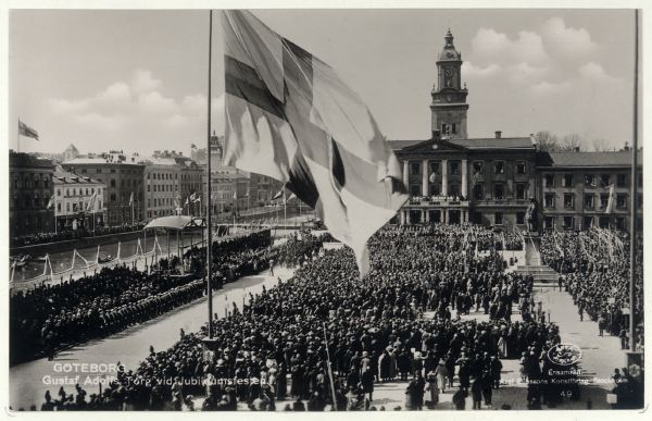 Gustav Adolfs torg vid Jubileumsfesten.